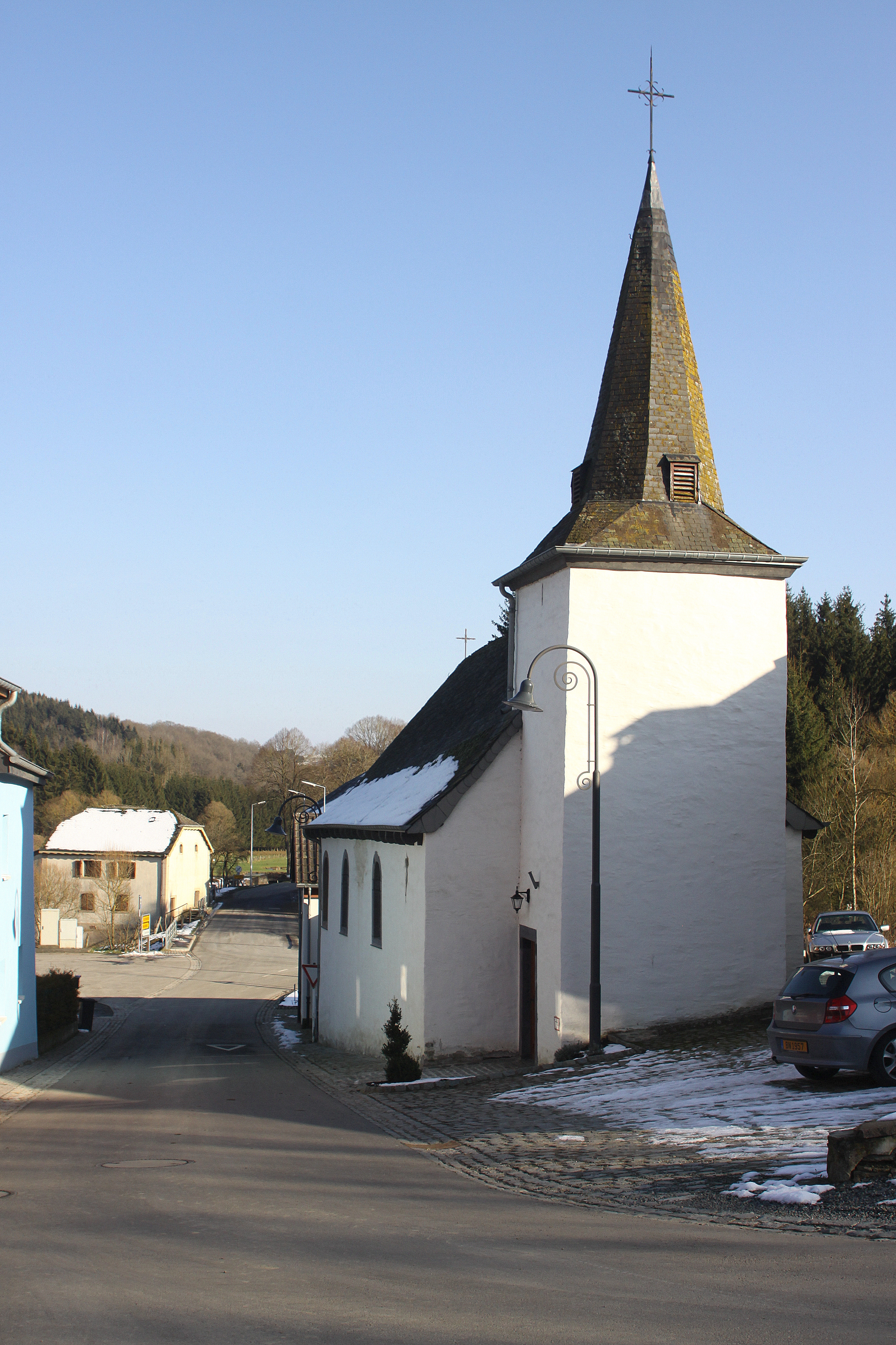 Kapell vu Saassel